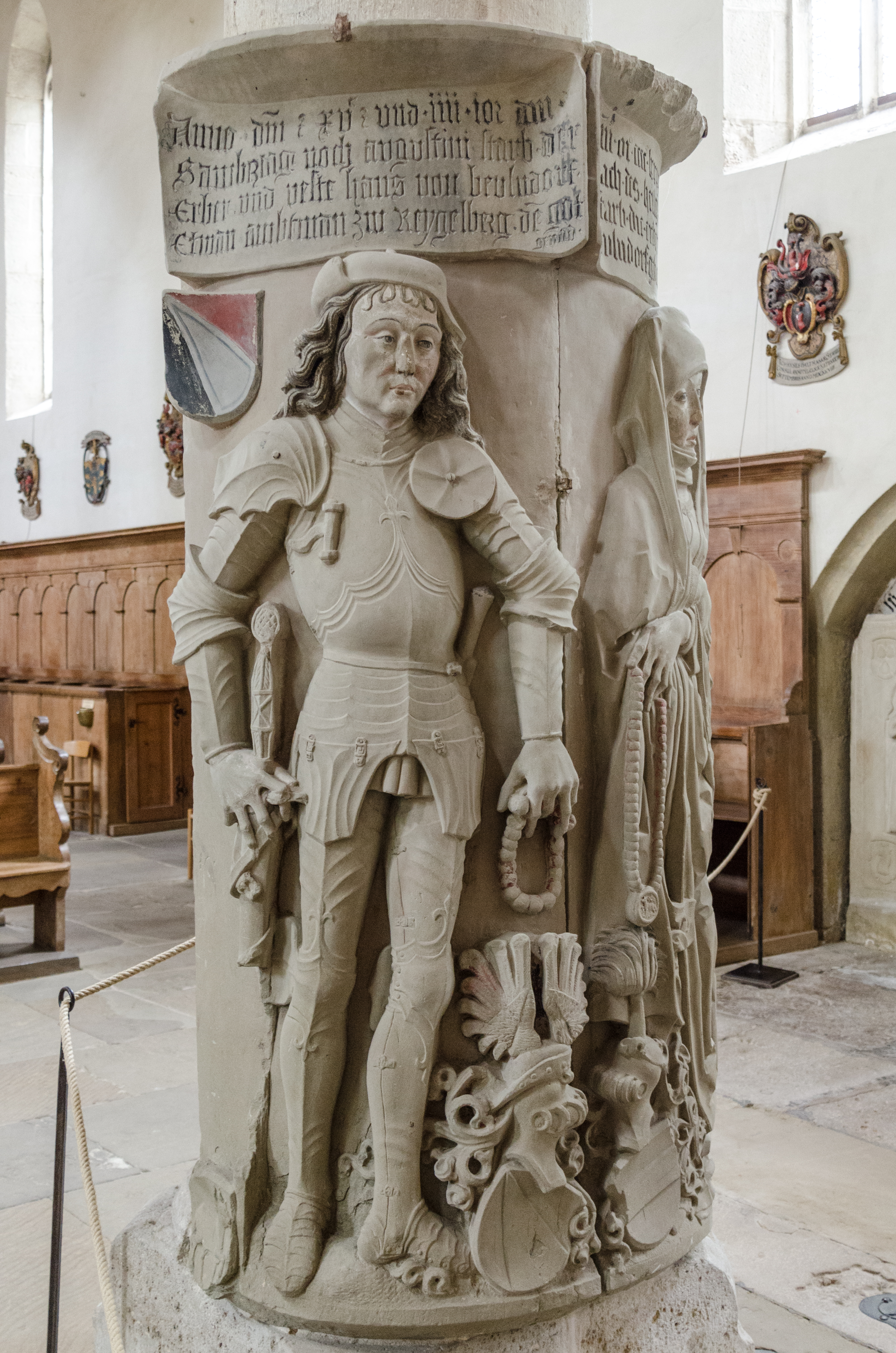 Rothenburg ob der Tauber, Herrngasse 19, Franziskanerkirche, Epitaph